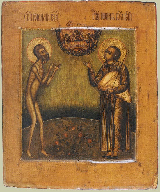 The Russian orthodox saint Ioann Moskovskij (John of Moscow) Иоанн, московский юродивый и Василий Блаженный